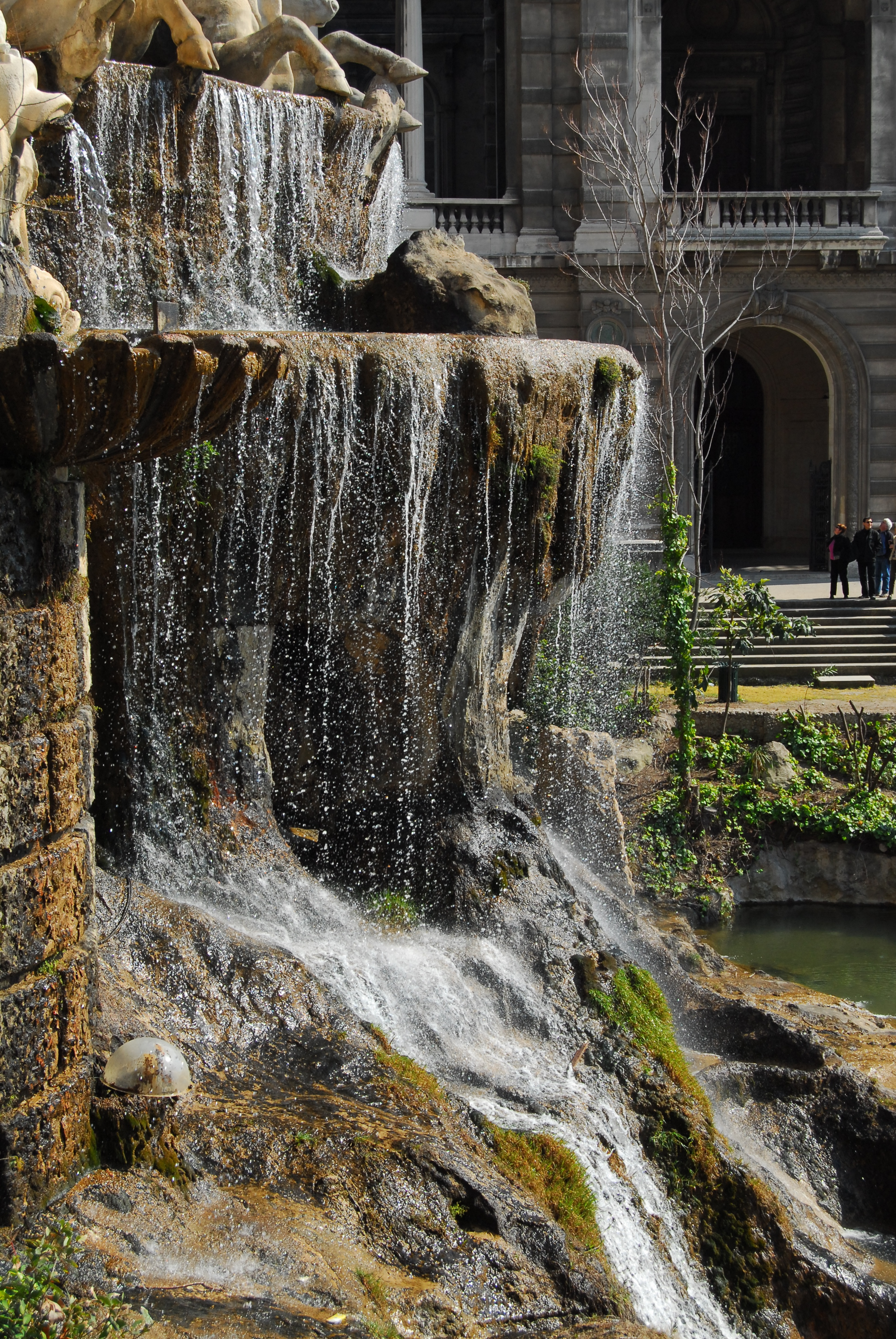 Der Wasserfall am Palais Longchamp, Marseille, Frankreich.